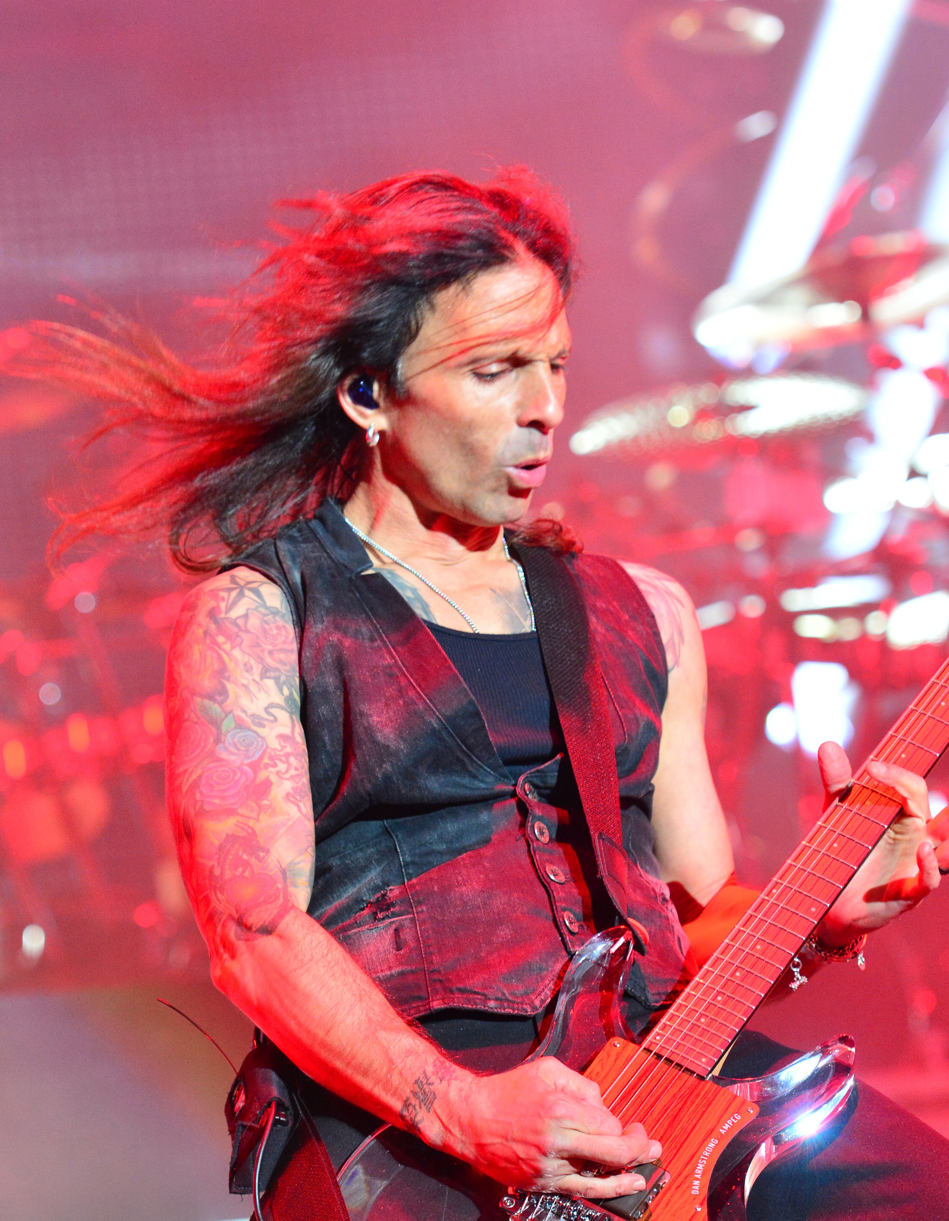 Savatage beim Wacken Open Air 2015